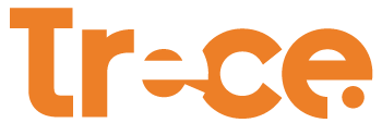 logo joven y actual